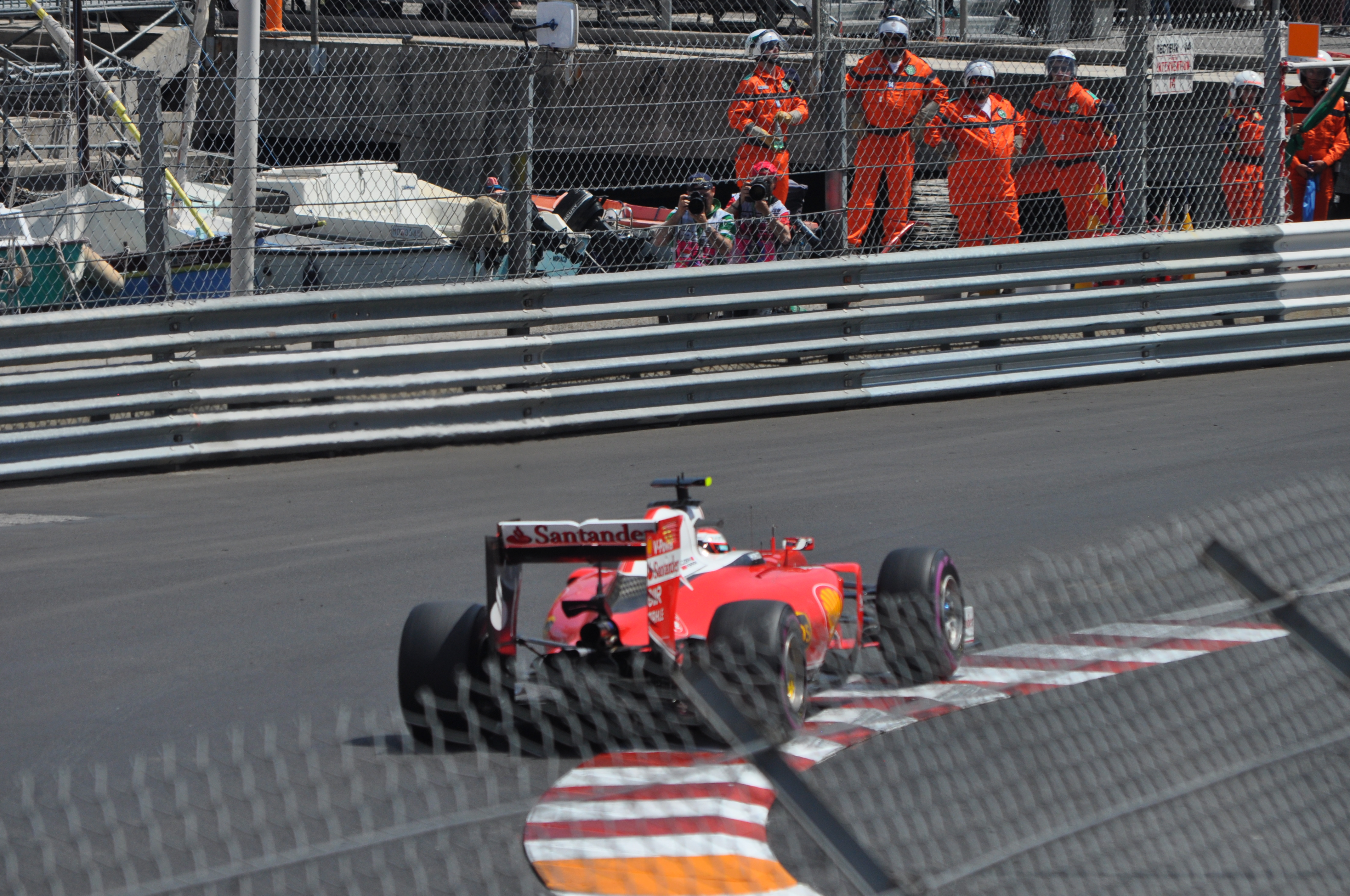 Kimi Raikkonen durante la Q2 all'uscita della curva Louis Chiron